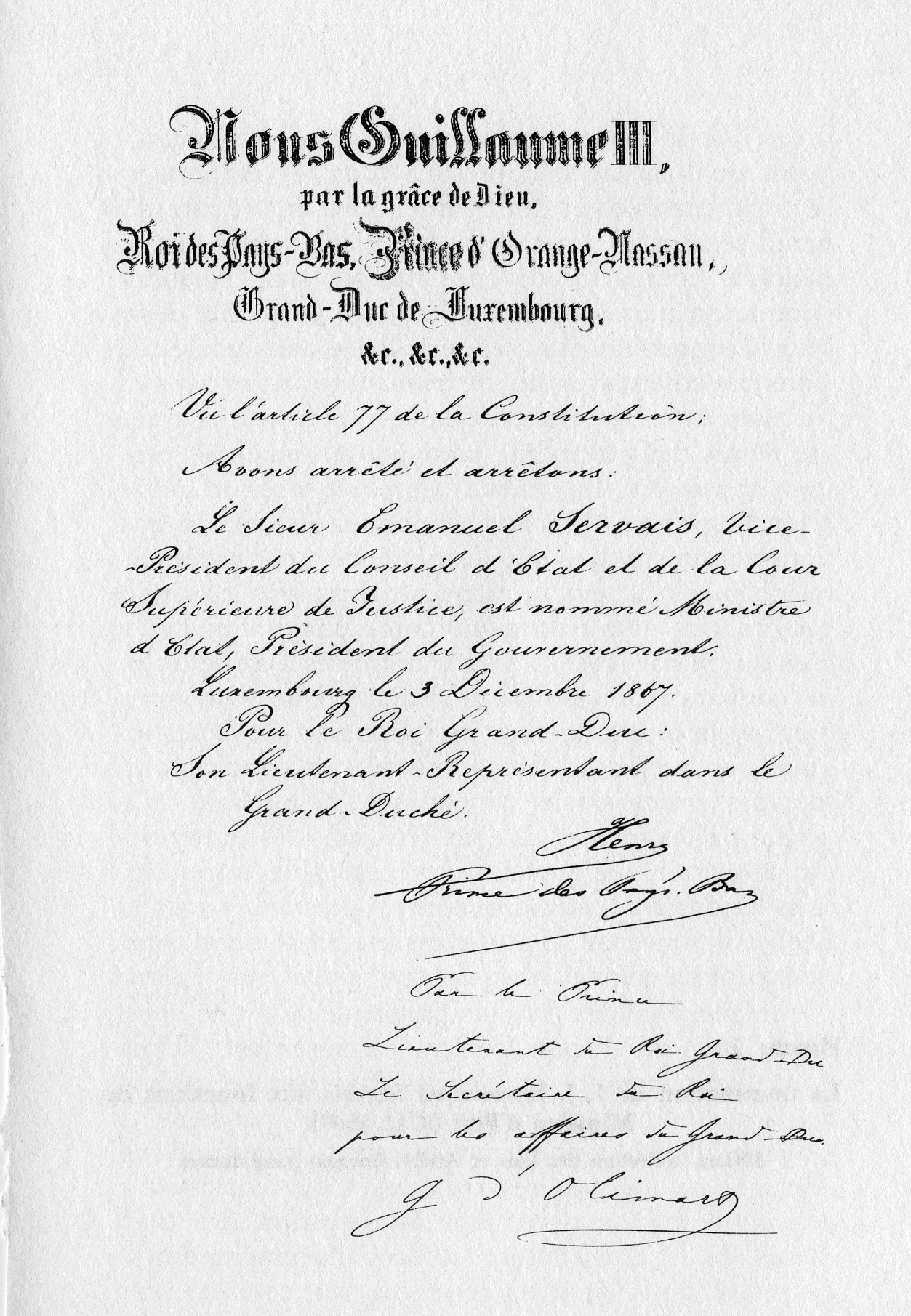 Original caption: “La nomination de L.J. Emmanuel Servais aux fonctions de Ministre d'État (3.12. 1867). ANLux, collection des Lois Arrêtés (royaux)-grand-ducaux. ”